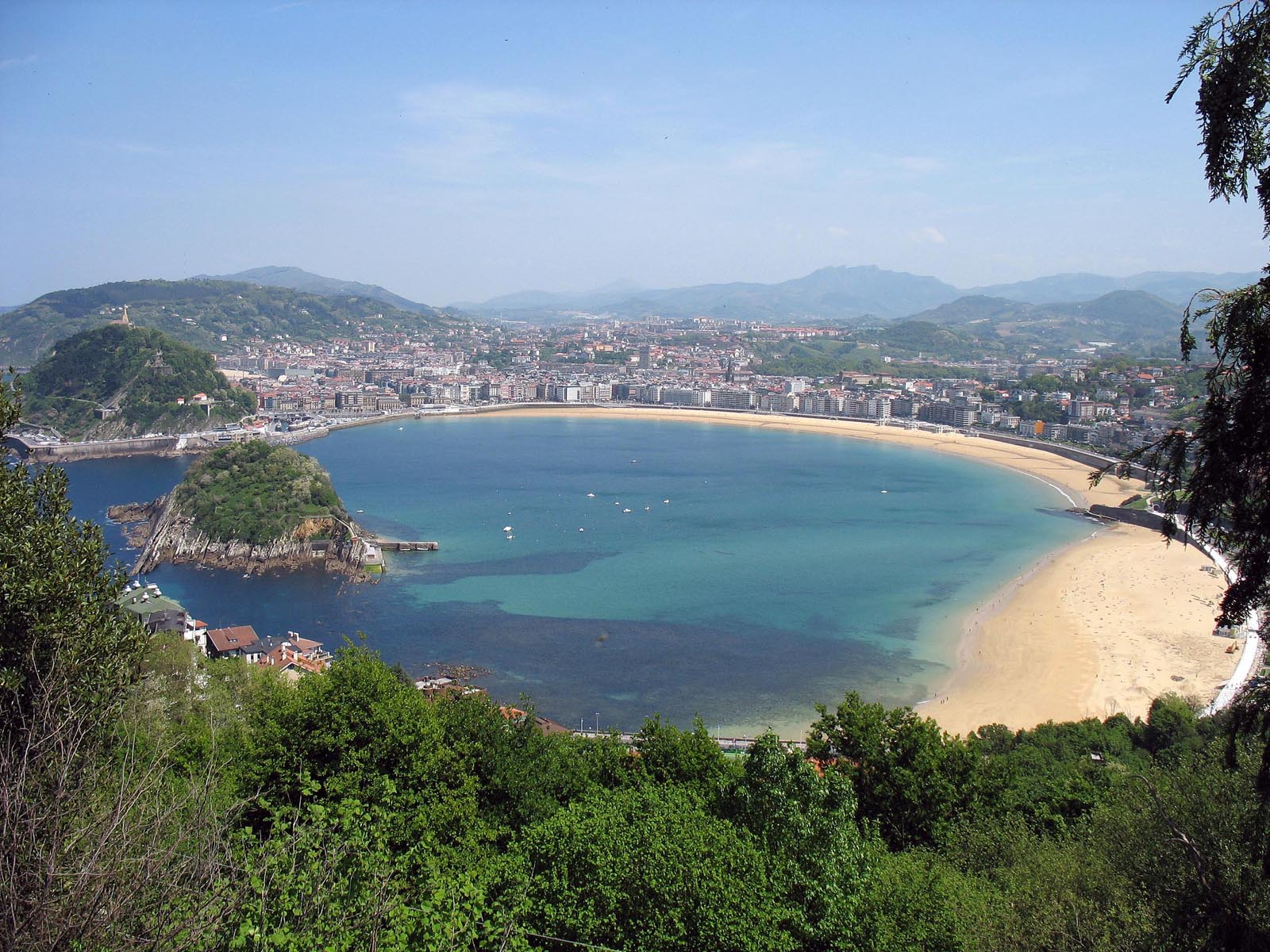 La plage de la Concha à Saint-Sébastien vue depuis le Monte Igueldo. Auteur Monster1000 Espagne mai 2006